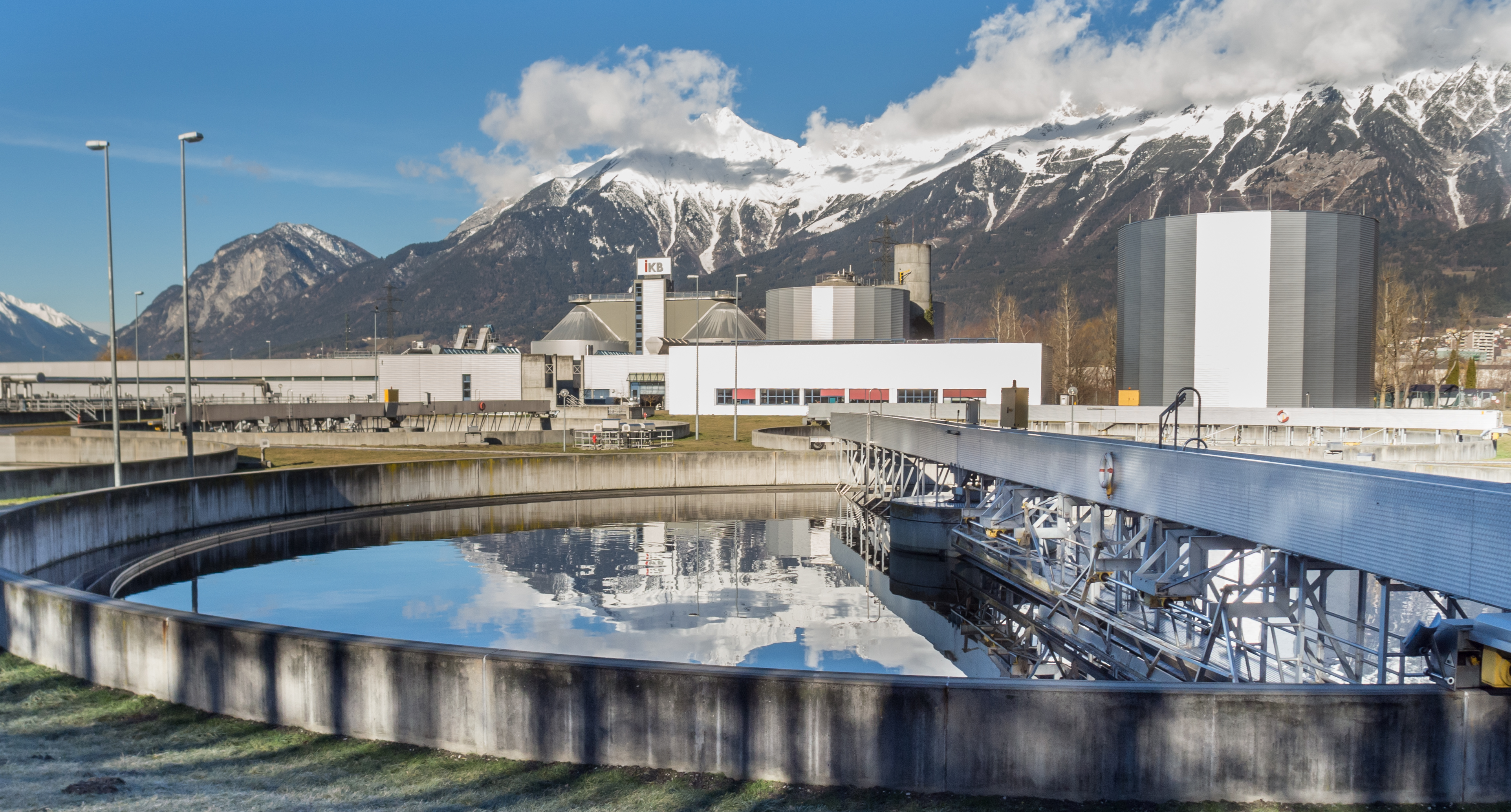 Kläranlage der Innsbrucker Kommunalbetriebe (IKB) im Innsbrucker Stadtteil Rossau